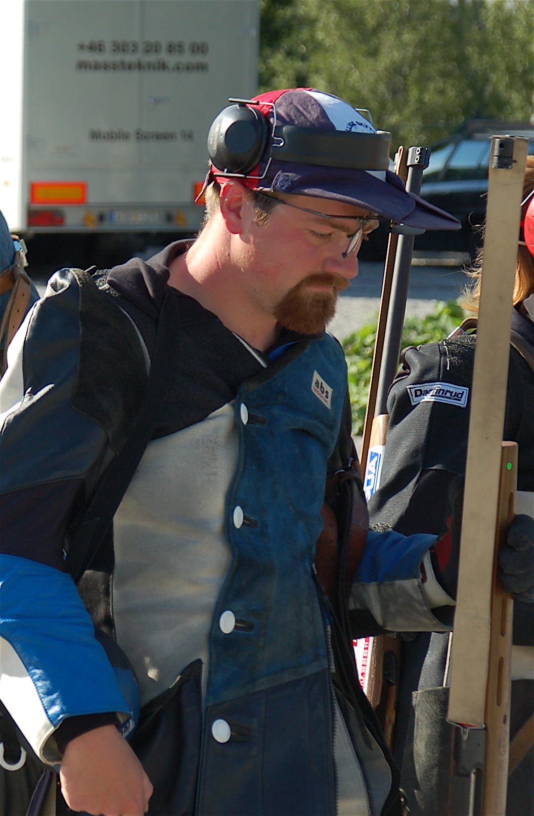 Jørgen Andersen, Hommelvik, LS2007